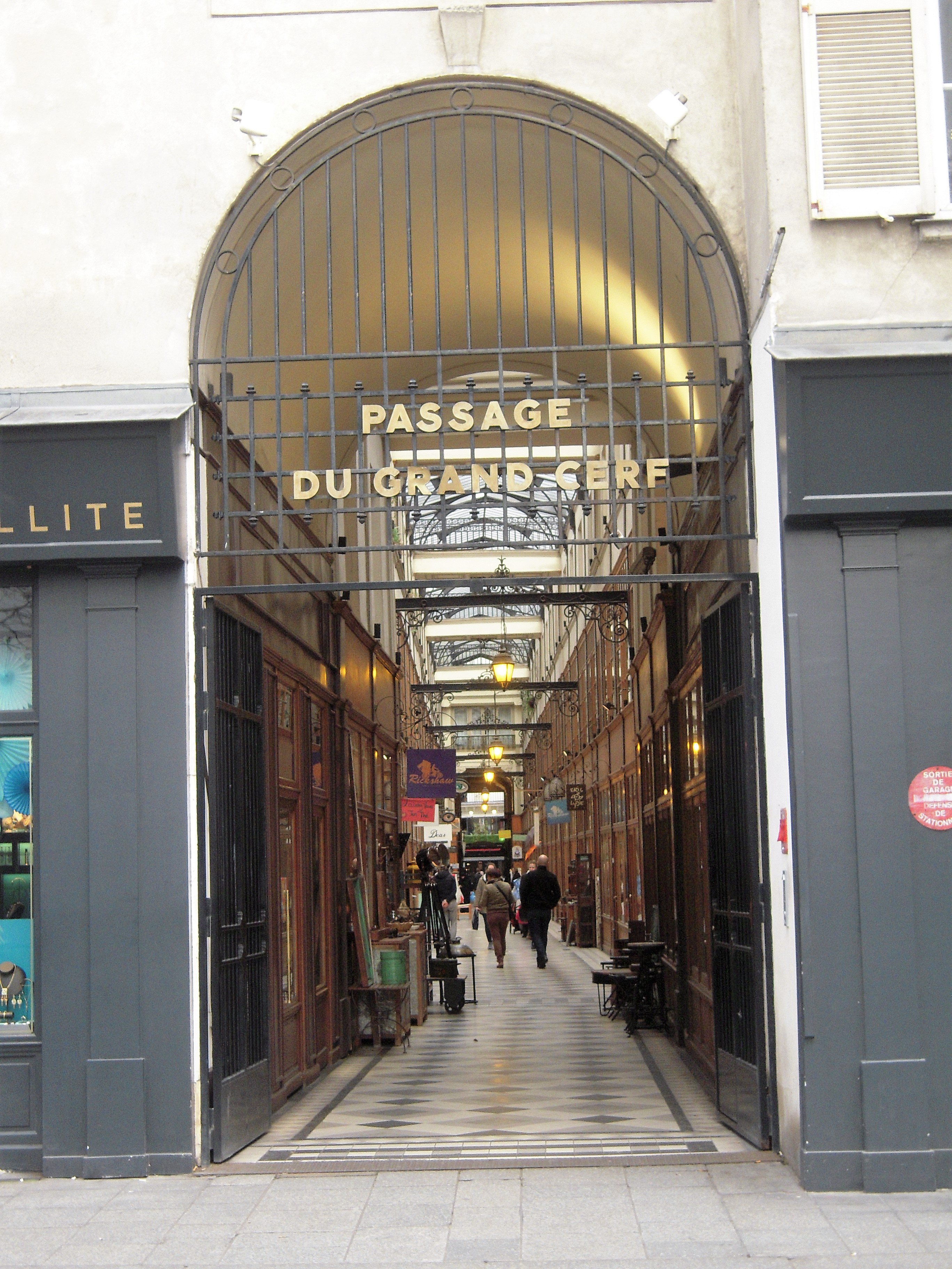 Le passage est ouvert en 1825 sur l'emplacement de l'hôtel du Grand Cerf. Une séquence du film de Louis Malle, Zazie dans le métro, a été tournée en 1960 dans le passage.